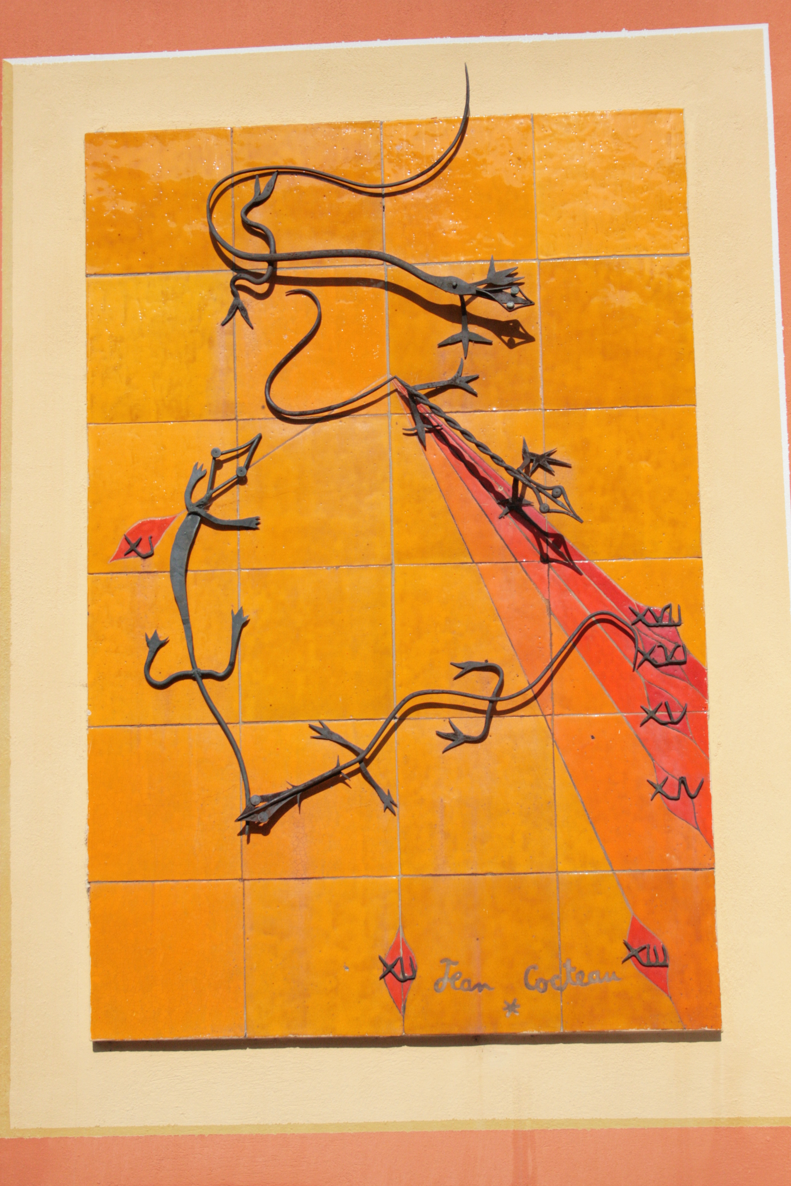 Coaraze, Alpes-Maritimes, France, cadran solaire, Jean Cocteau, les Lézards, 1961